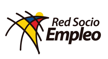 red socio empleo